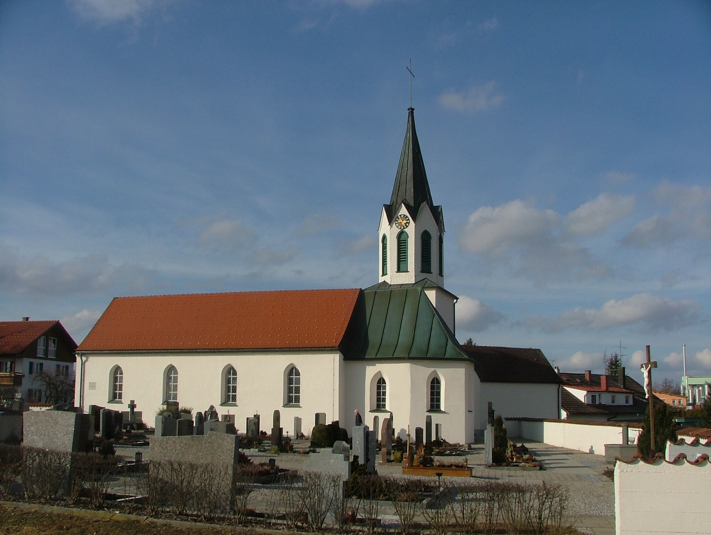 Ursularied St.Ursula